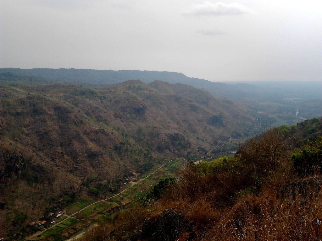 Kebun Buah Mangunan